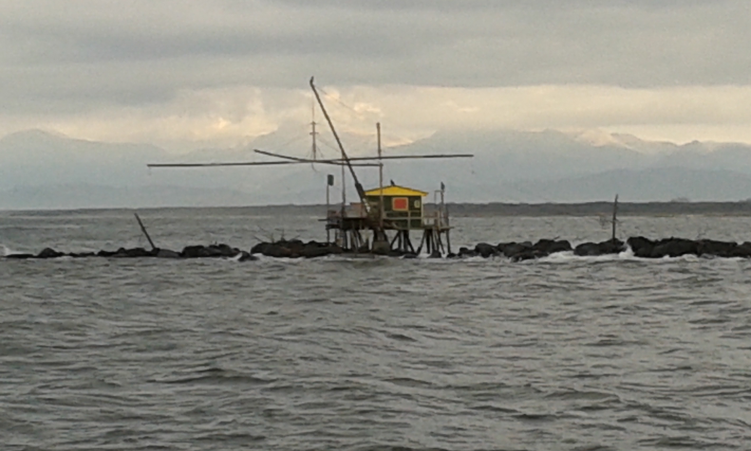 Un Retone